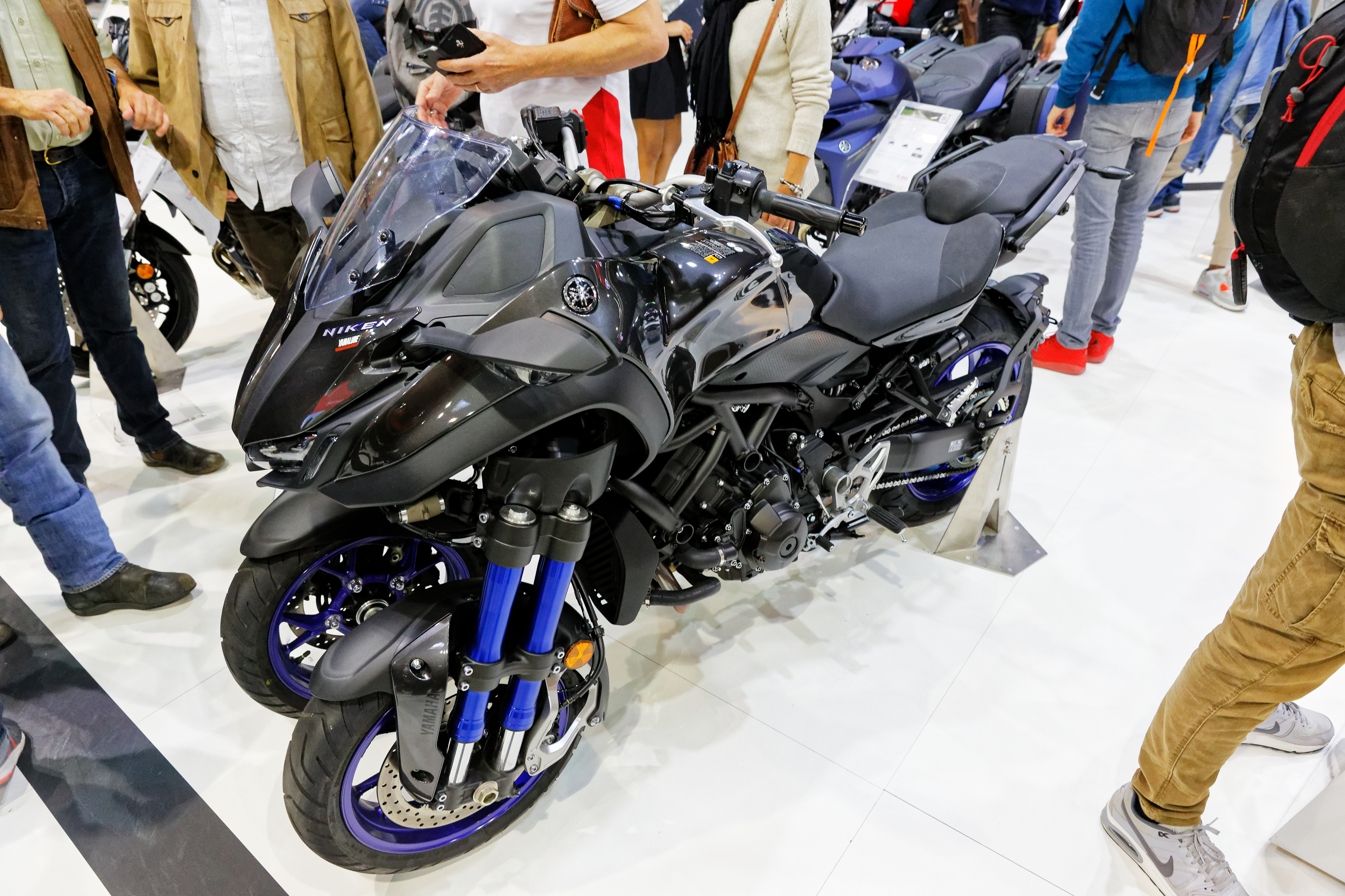 Une Yamaha Niken exposée lors du mondial de l'automobile de Paris 2018.